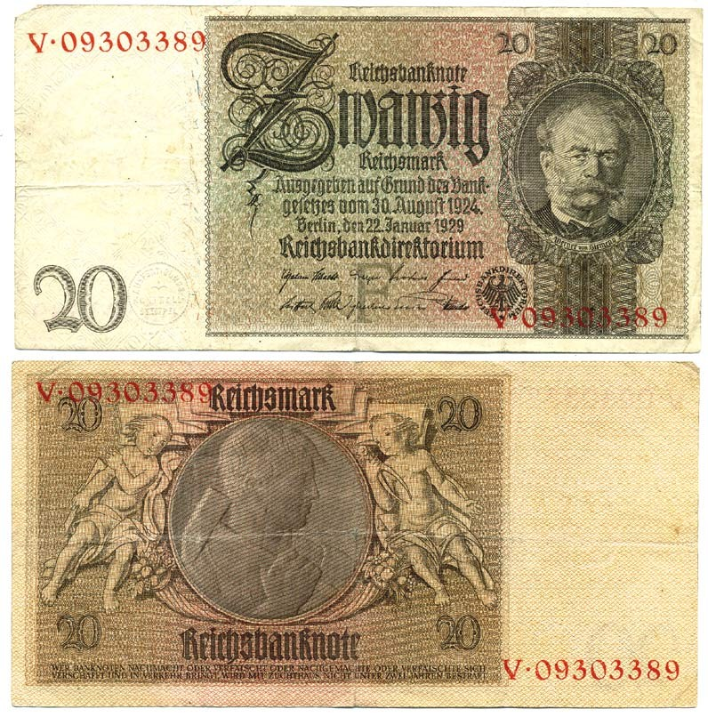 20 рейхсмарок 1929 год. Германия.